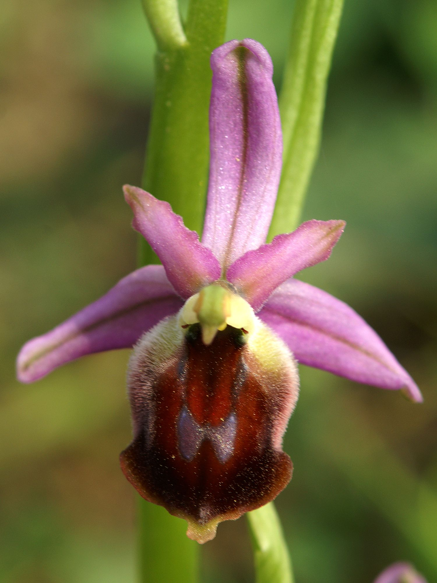 Ophrys argolica